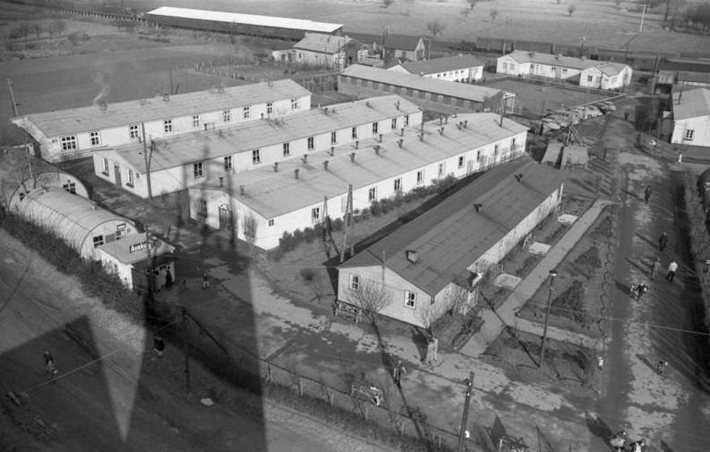 Lager Friedland Ankunft der Wissenschaftler aus Sochumi (Lageraufnahmen und Ankunft von Aussiedlern aus Polen), 12. Februar - 16. Februar 1958